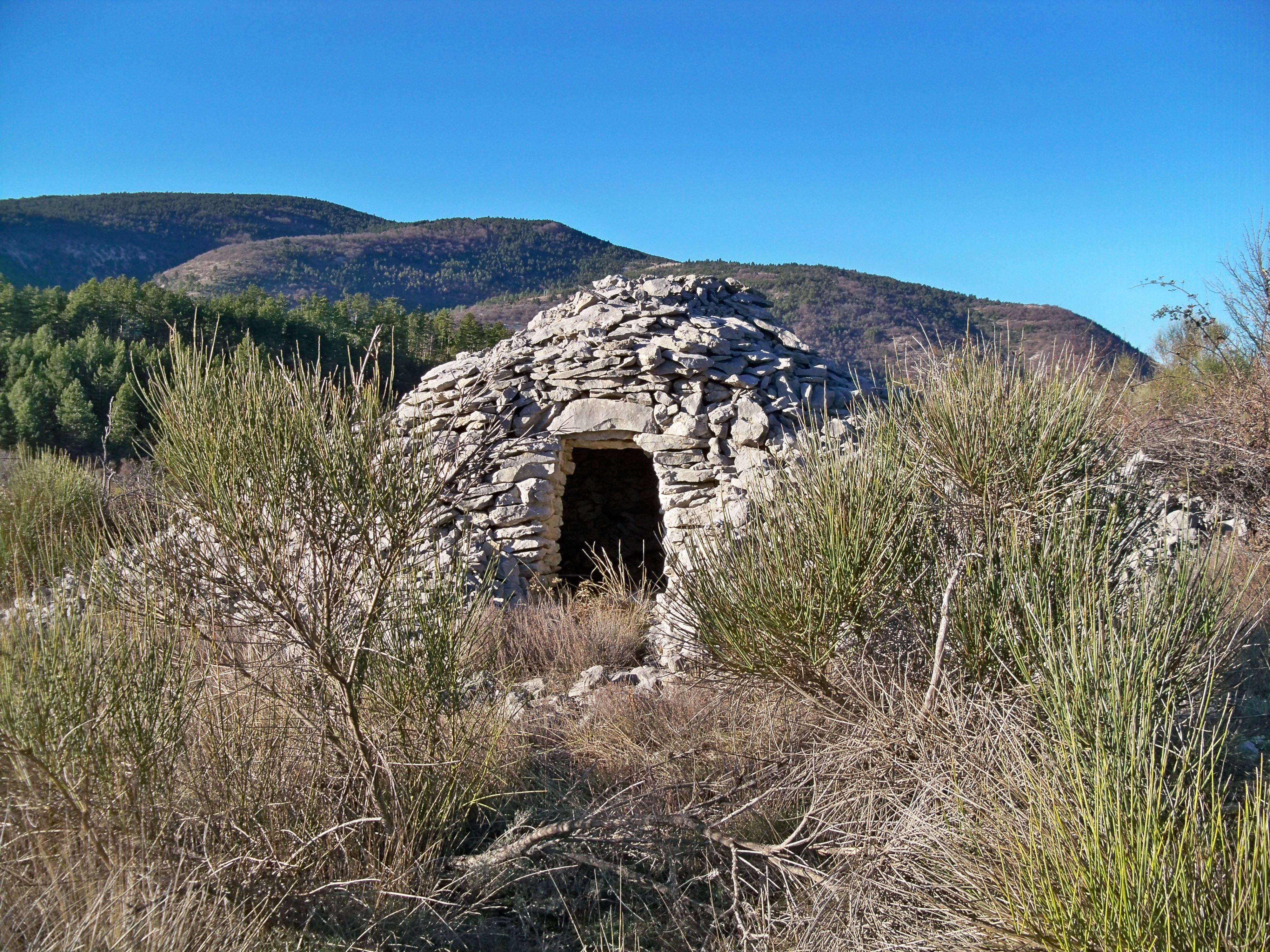 Borie à Aurel, Vaucluse, France